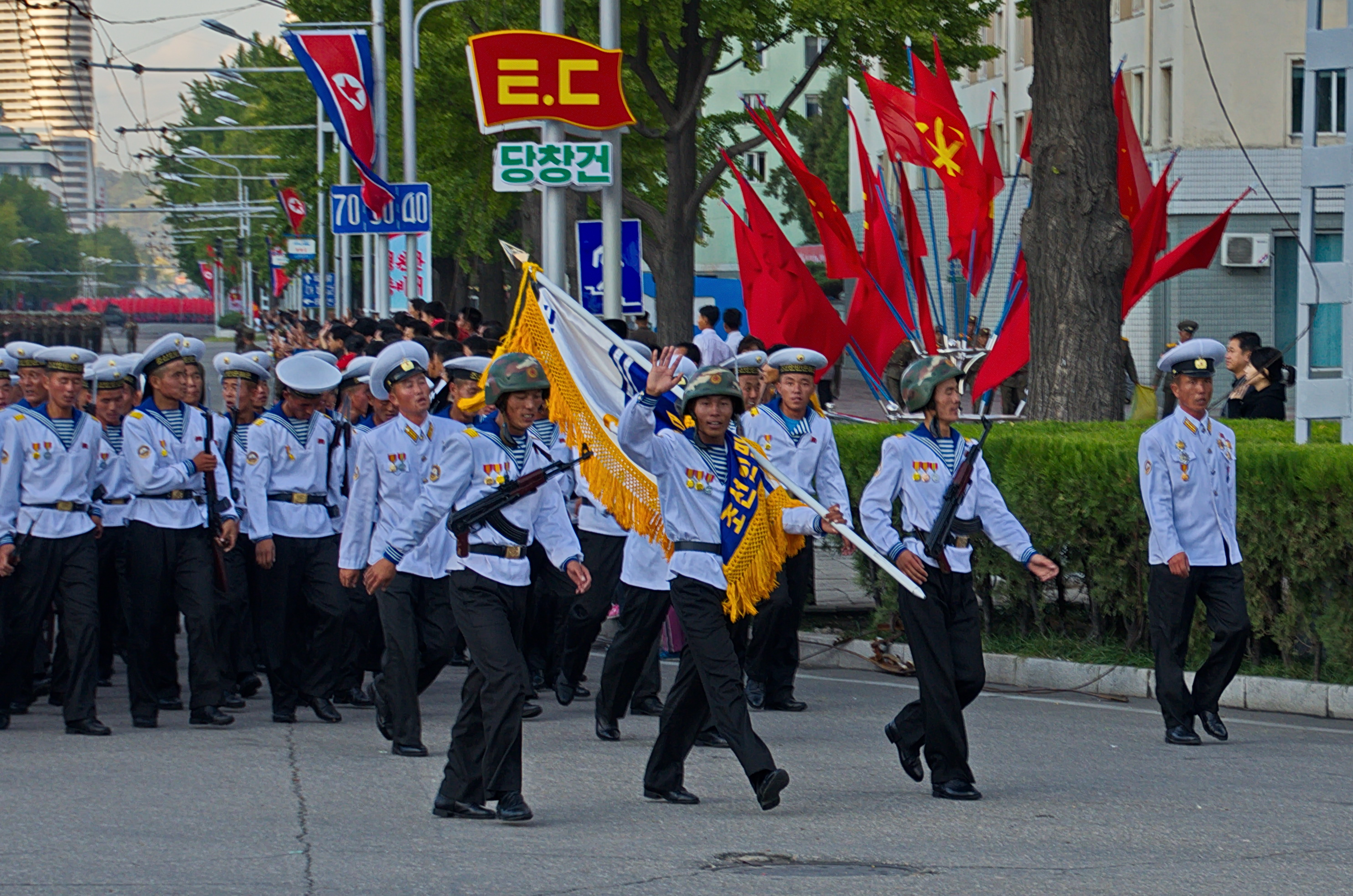 Nordkorea 2015 - Pjöngjang - Parade zum 75. JT der Arbeiterpartei